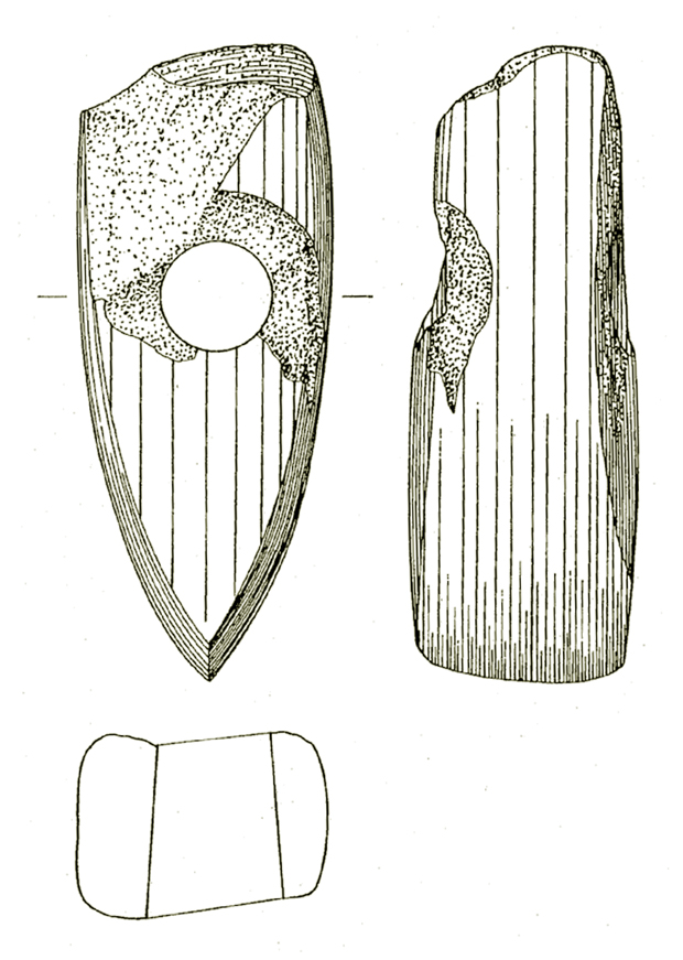 Zeichnung der etwa 1978 auf einem Kartoffelacker nordwestlich von Vernawahlshausen gefundenen kleinen Steinaxt (L. 10,3; B. 4,15; D. 3,7; Bohrungs-Dm. 2,2-1,85 cm; Gew. 233 g) aus grünlichgrauem Felsgestein. Datierung: Mittelneolithikum (Rössener Kultur). Verbleib: Museum Hofgeismar, ohne Inventar-Nummer. Literatur: Roland Henne, Mittelalterliche Wüstungen im Gericht Gieselwerder und ihre Siedlungsplätze. In: Waldenserdörfer Gottstreu und Gewissenruh. Beiträge zur Orts- und Heimatgeschichte und zum Dorfleben 1722-1997, hrsg. vom Gemeindevorstand der Gemeinde Oberweser und der Sparkassenstiftung des Landkreises Kassel (Oberweser 1997) 403-454, hier 405 ("überschliffene Steingeräte [Äxte, Beile] aus der Jungsteinzeit liegen als Einzelfunde vor aus [...] Vernawahlshausen [1 Steinaxt]", mit Anm. 7), 452 Anm. 7 ("die in Vernawahlshausen gefunde Steinaxt ist in das Museum Hofgeismar abgegeben worden").